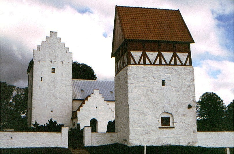 Bodils Kirke i Danmark. Bodils kirke